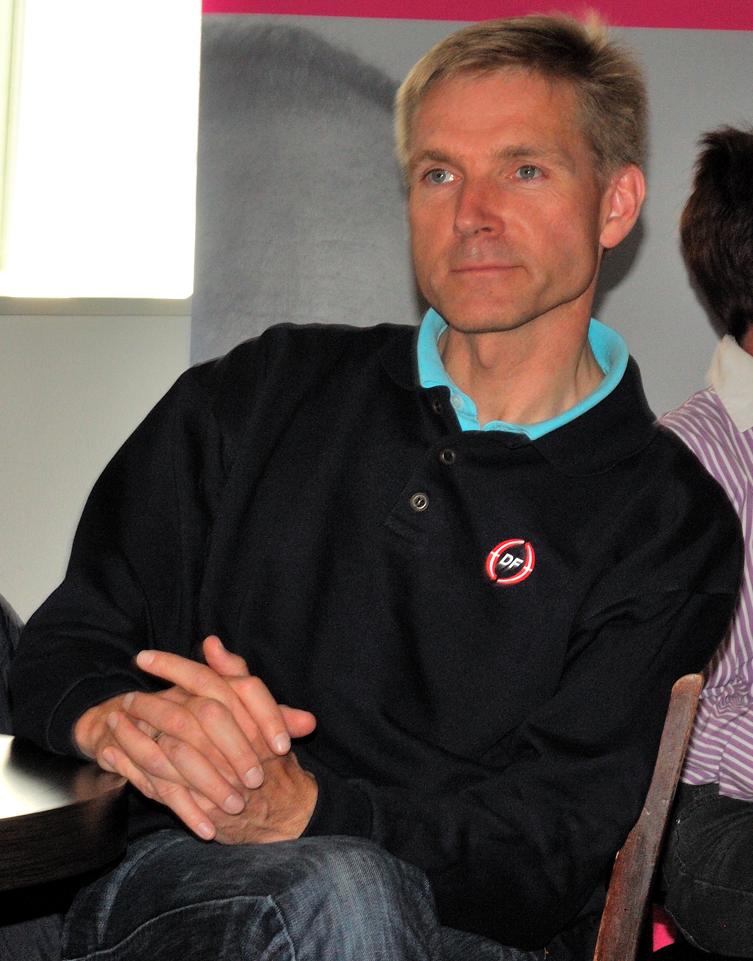 Kristian Thulesen Dahl, politiker, Dansk Folkeparti, Ridder af Dannebrog